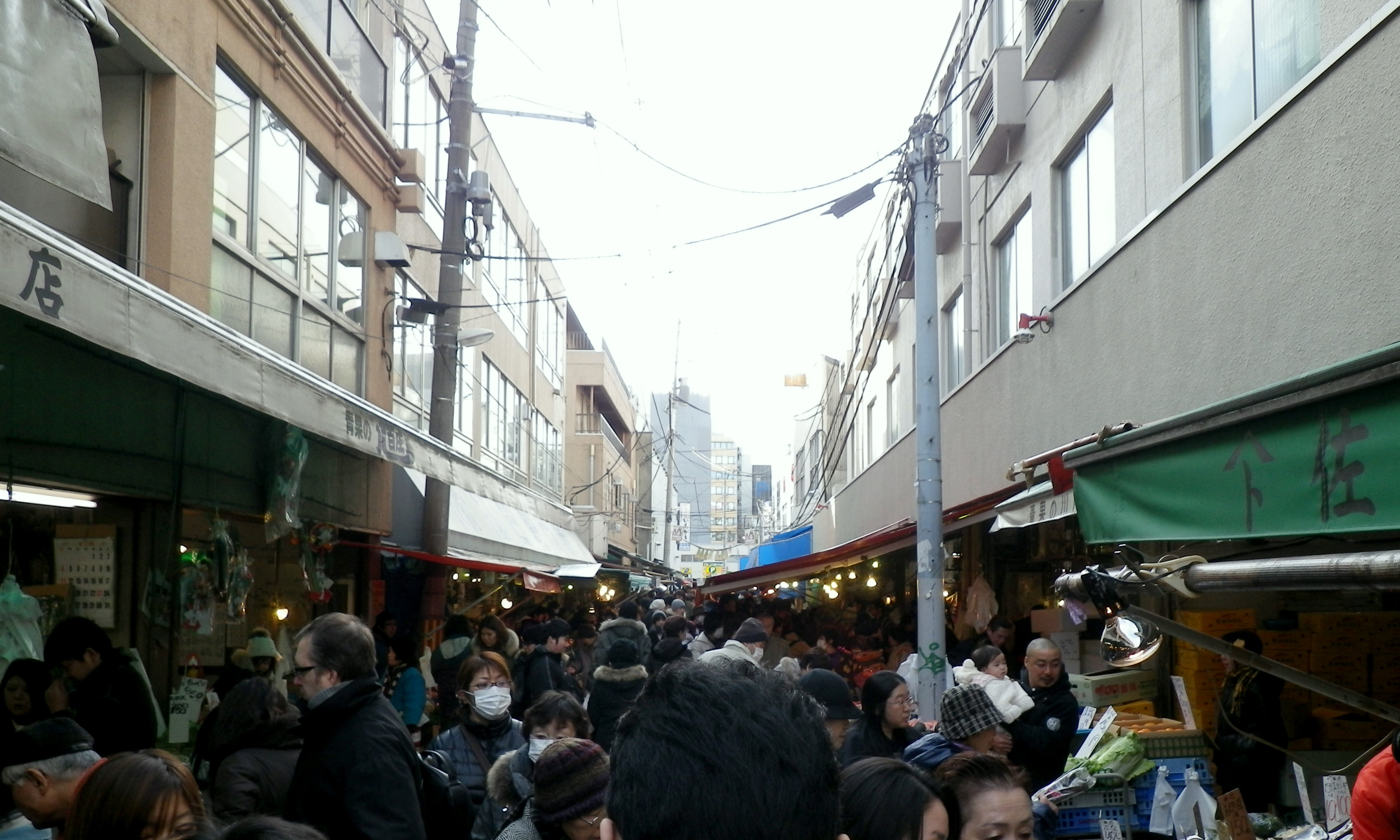 仙台朝市の朝市通り